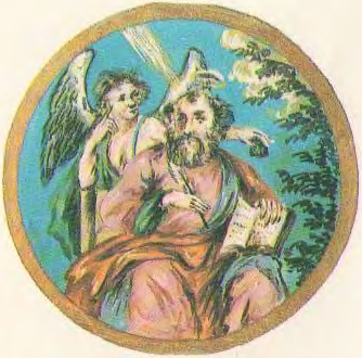 Беларуская (тарашкевіца): Ялоўка (Jałoŭka). Магдэбурскі герб